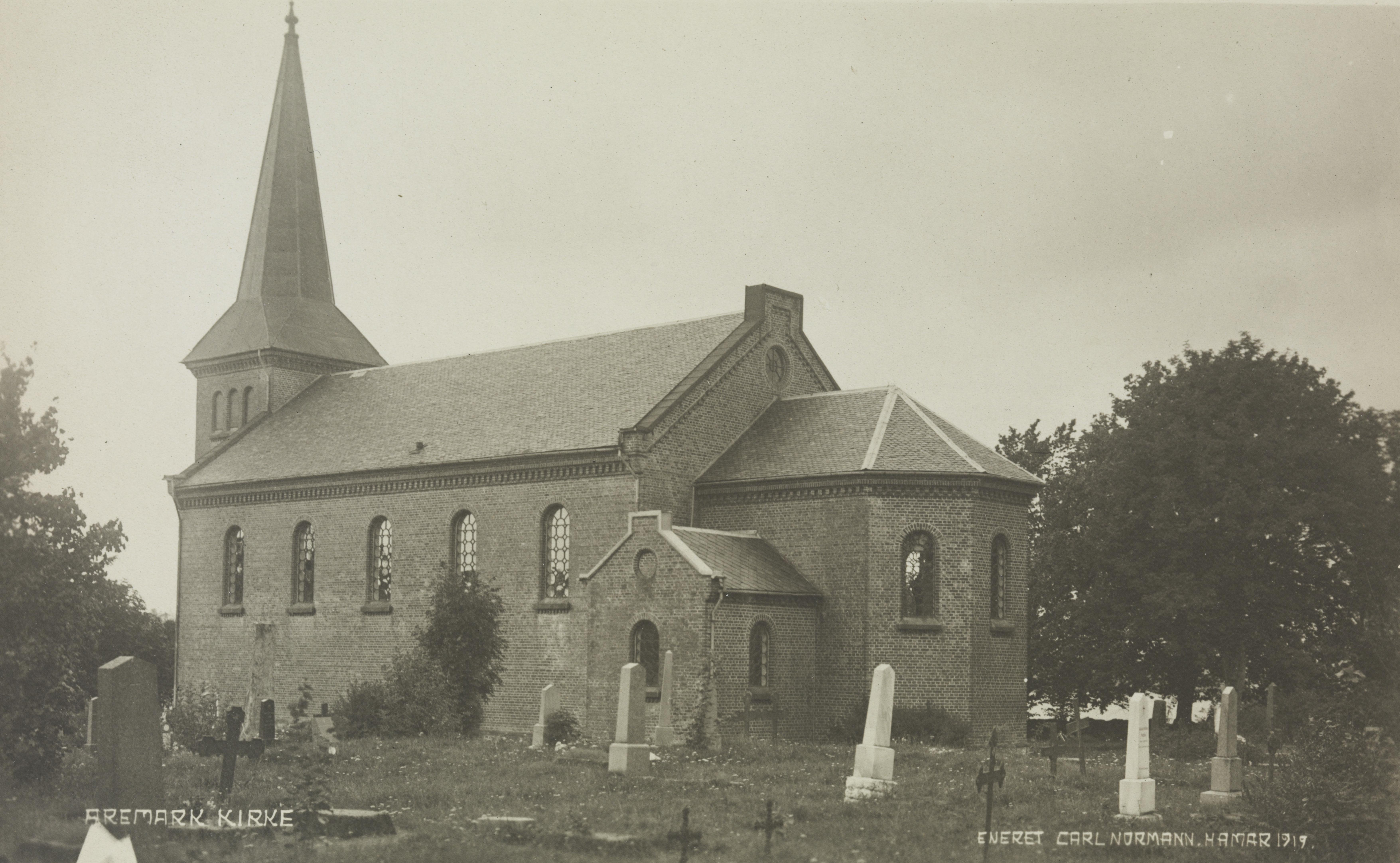 Bildet er hentet fra Nasjonalbibliotekets bildesamling Aremark, Østfold